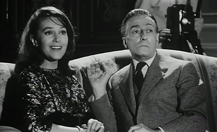 Scena del film Totò Diabolicus (1962)